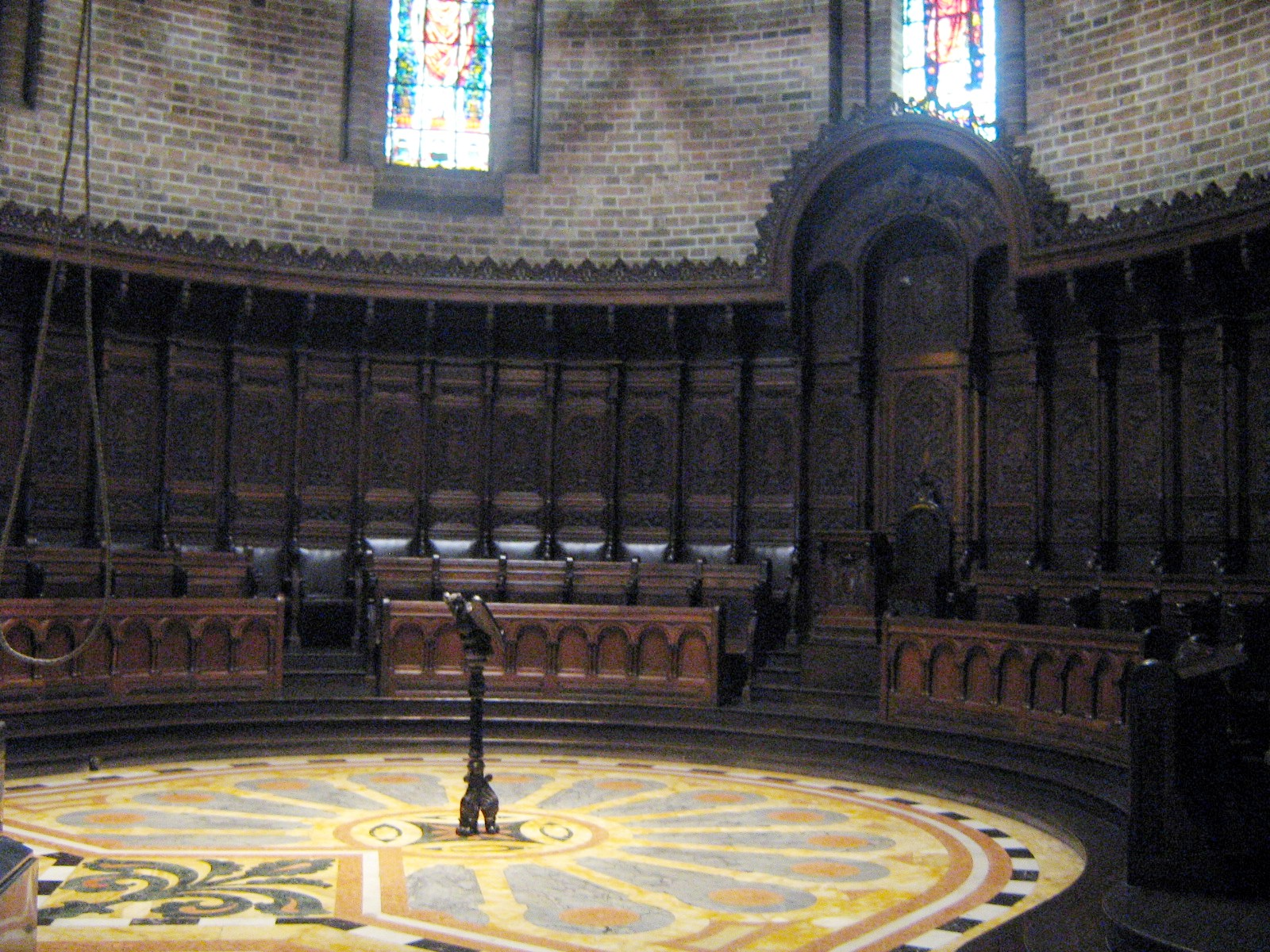 Sillería del coro de los Canónigos de la Catedral Metropolitana de Medellín. Colombia